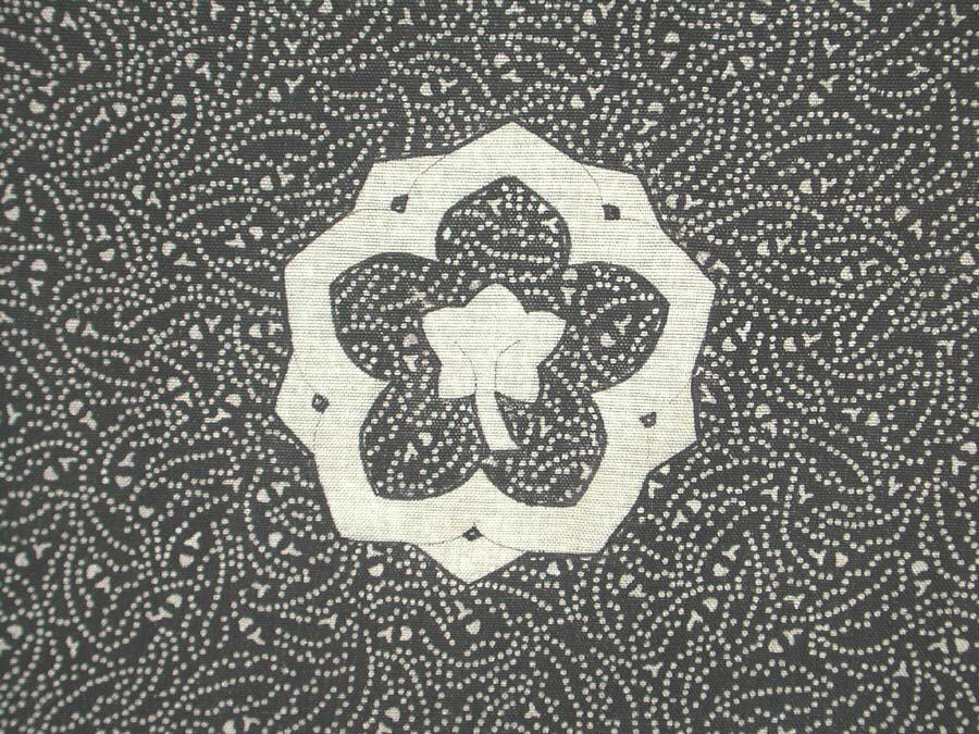 Japan; Kosode; Costumes